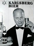 Curd Jürgens Werbefoto